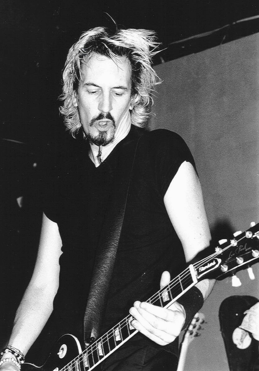 Owen Packard von earthtone9 live auf der Abschiedstour 2002